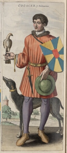 Odoaker, afgebeeld in Flandria Illustrata - 17e eeuw